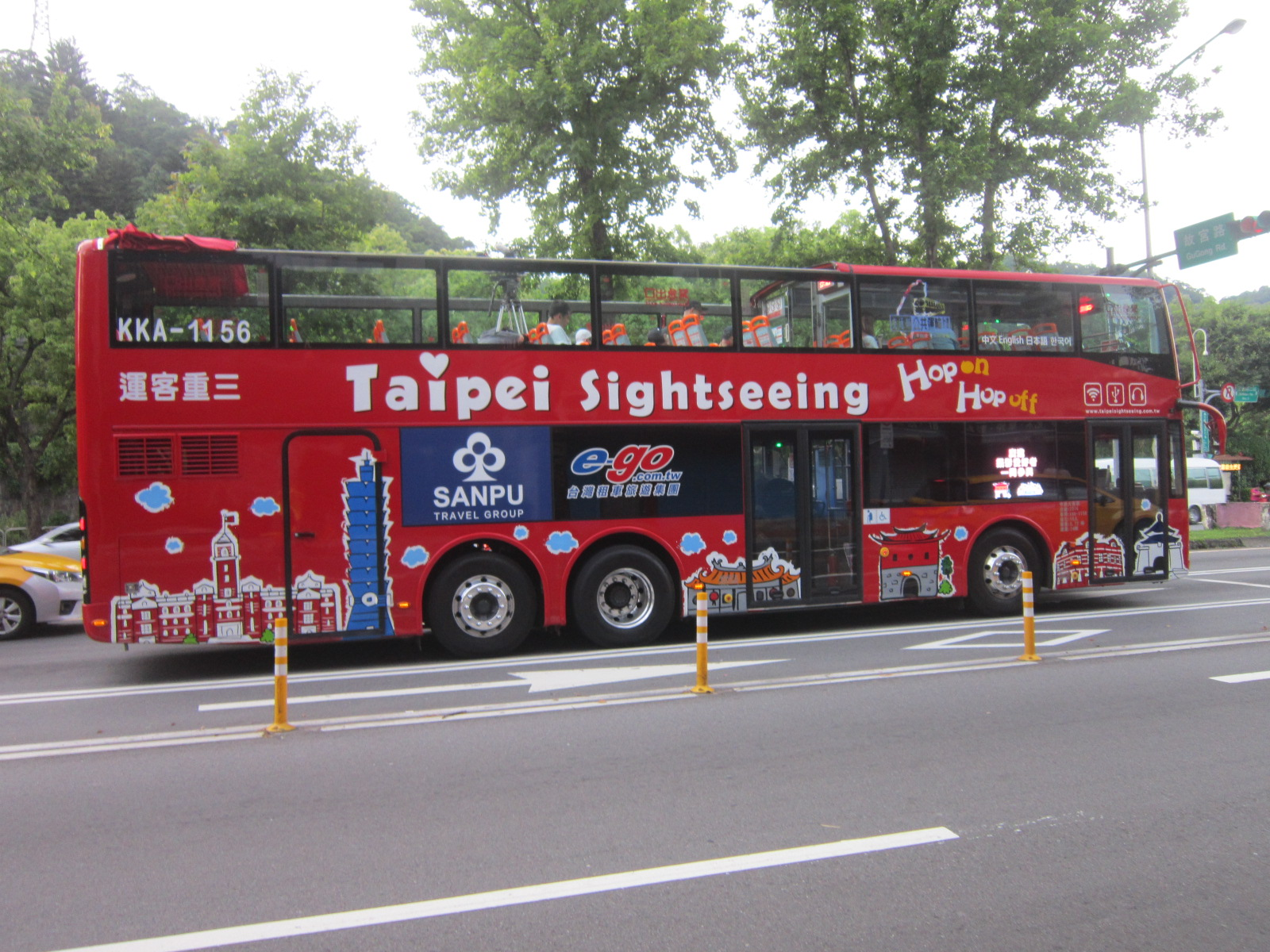 三重客運Volvo B8RLE雙層低地板大客車KKA-1156。